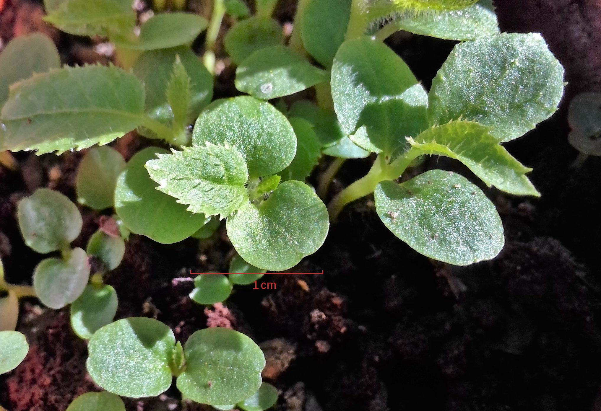 Kiwis germés avec leurs premières vraies feuilles.